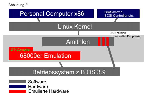 Selbst kreiert, deshalb Public Domain. Ich erhebe keinerlei Urheberrechte.